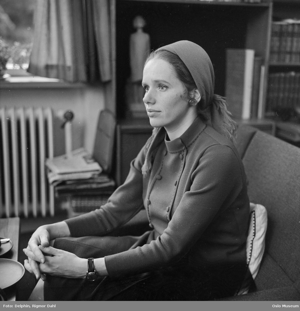 Liv Ullmann i 1966.